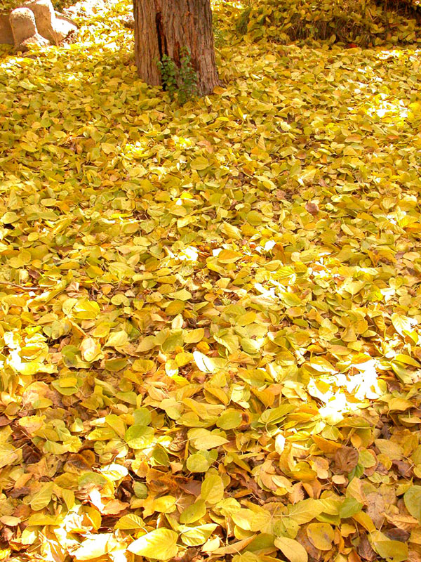 黄葉の落葉.Ajin dojin